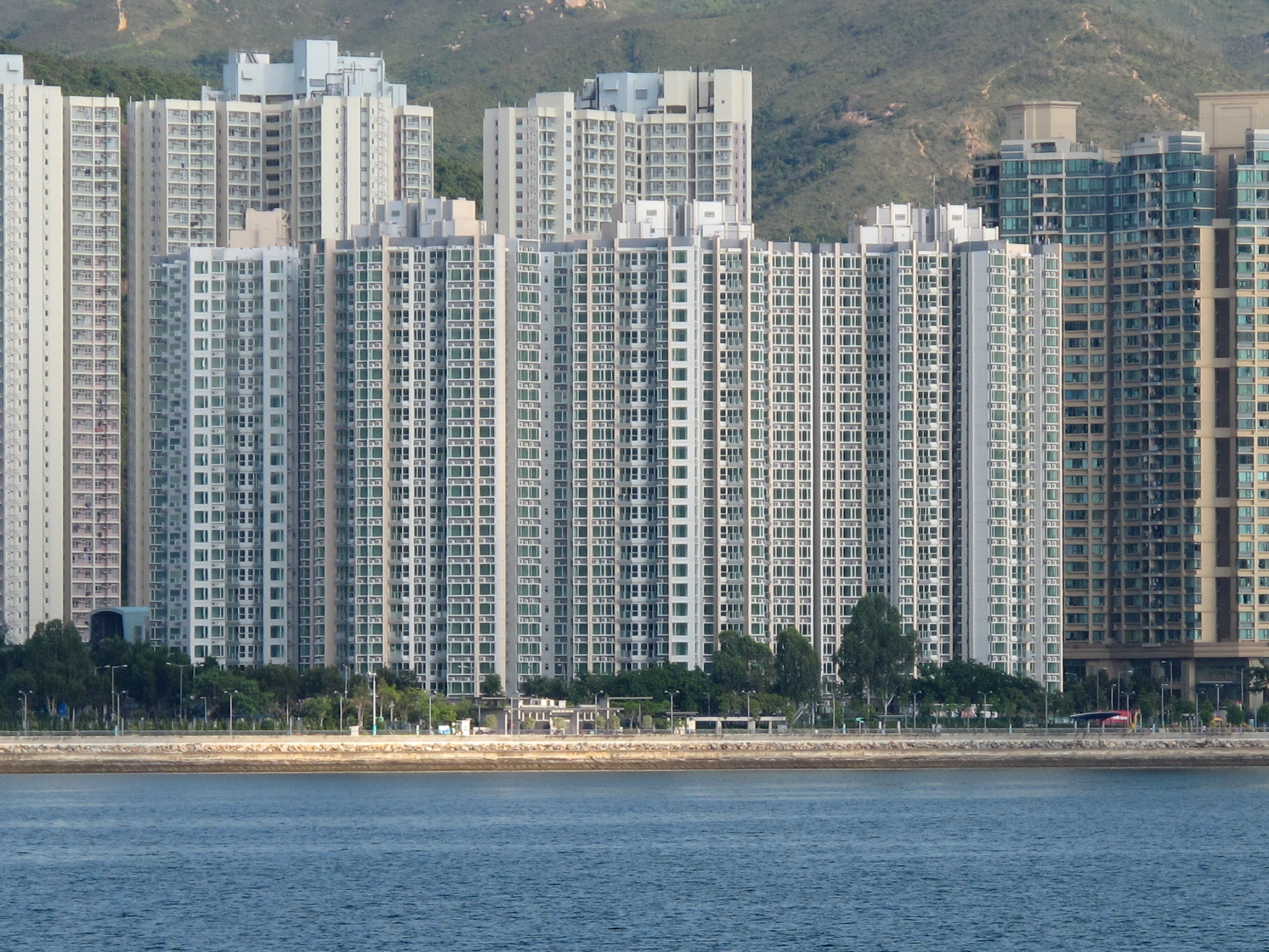 Oceanaire 天宇海